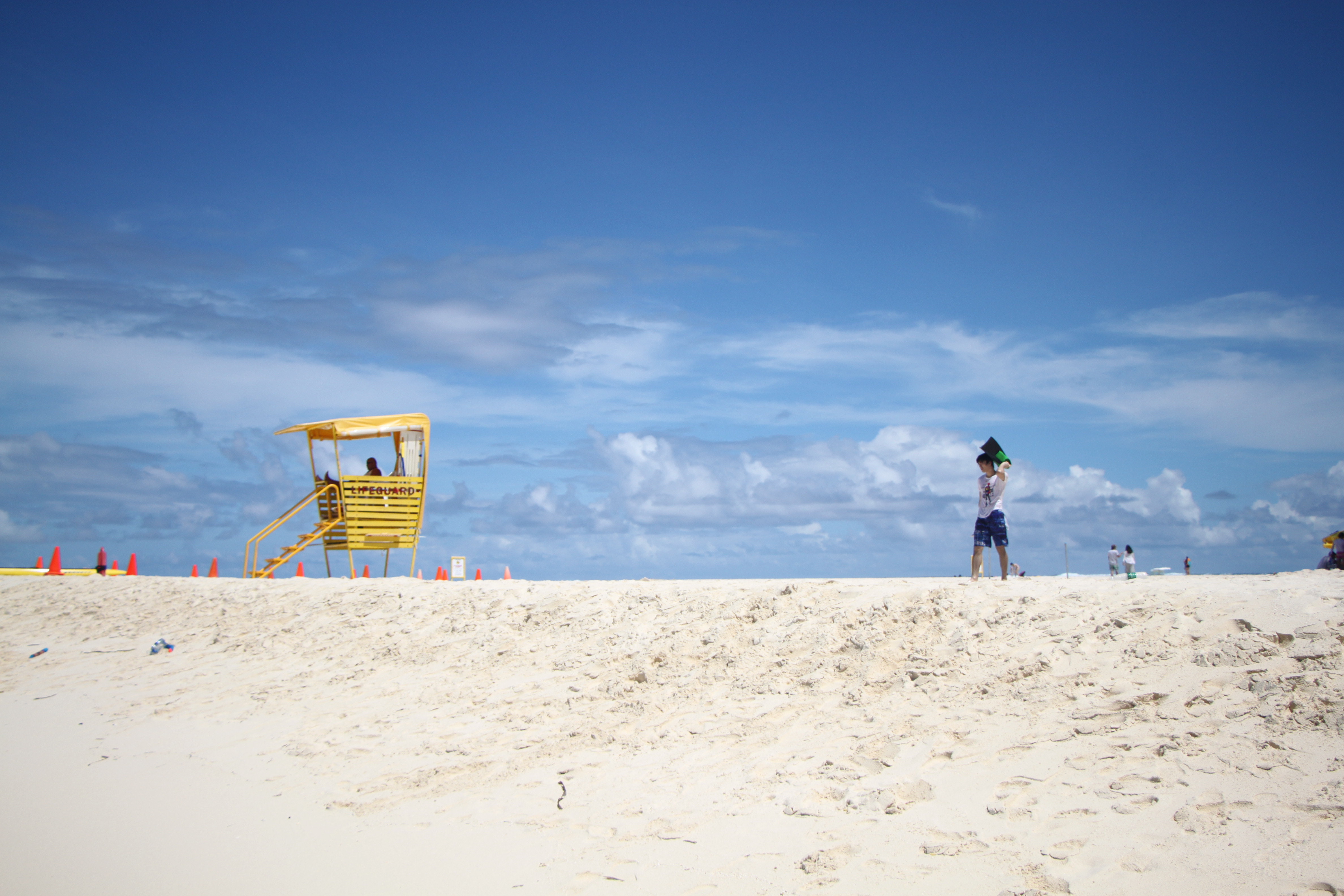 中文（中国大陆）: 军舰岛海滩